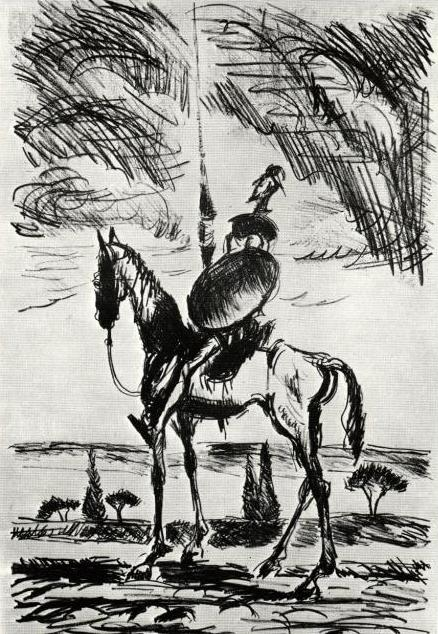 Don Quijote – 1944 – litografie 63,3 × 43,8 cm, sign. vpravo dole: Majerník